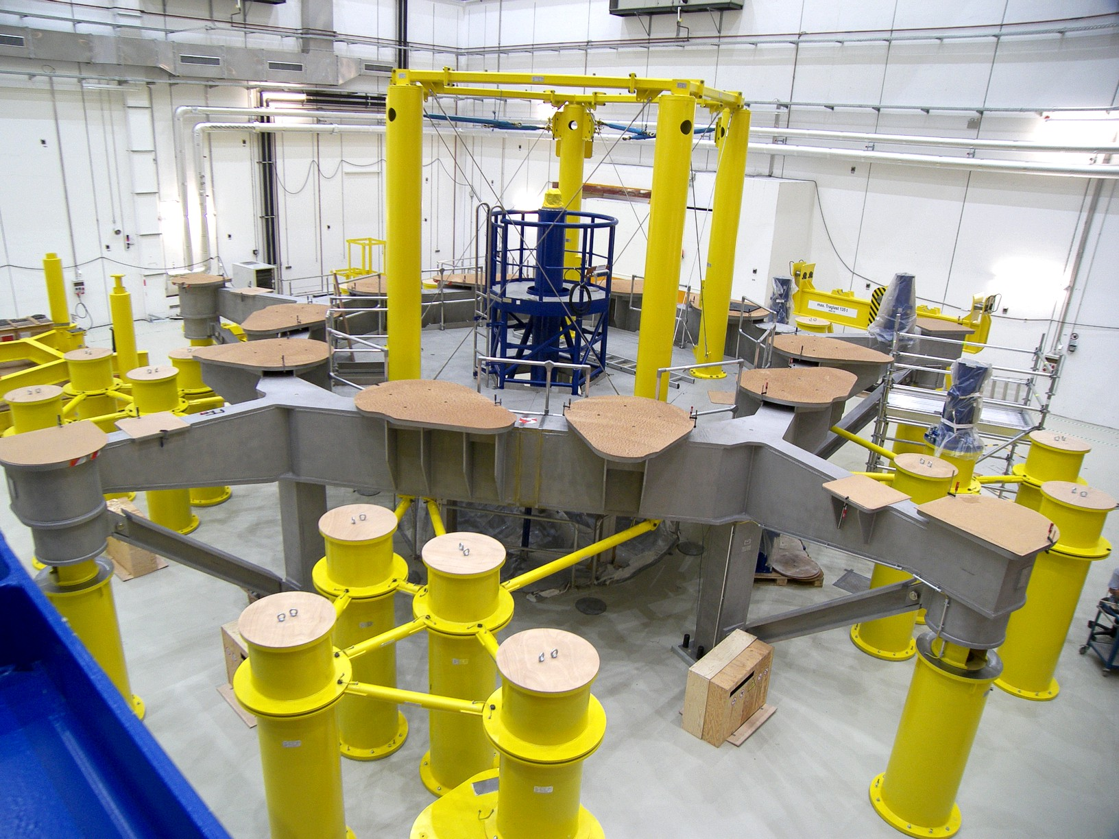 Stellarator Wendelstein 7-X Reaktorgestell